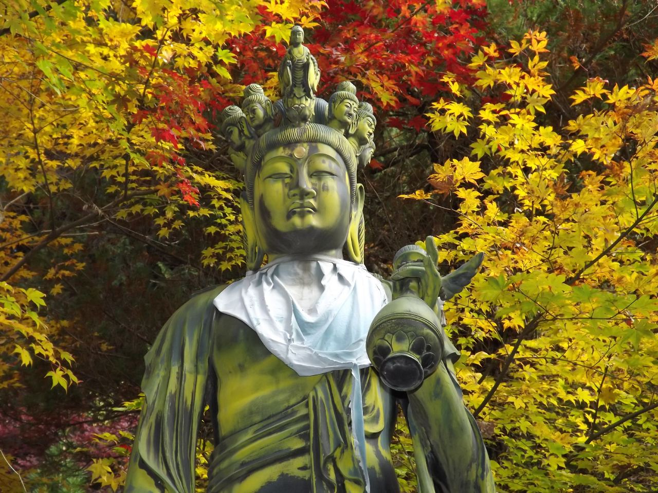 大宝寺の十一面観音菩薩